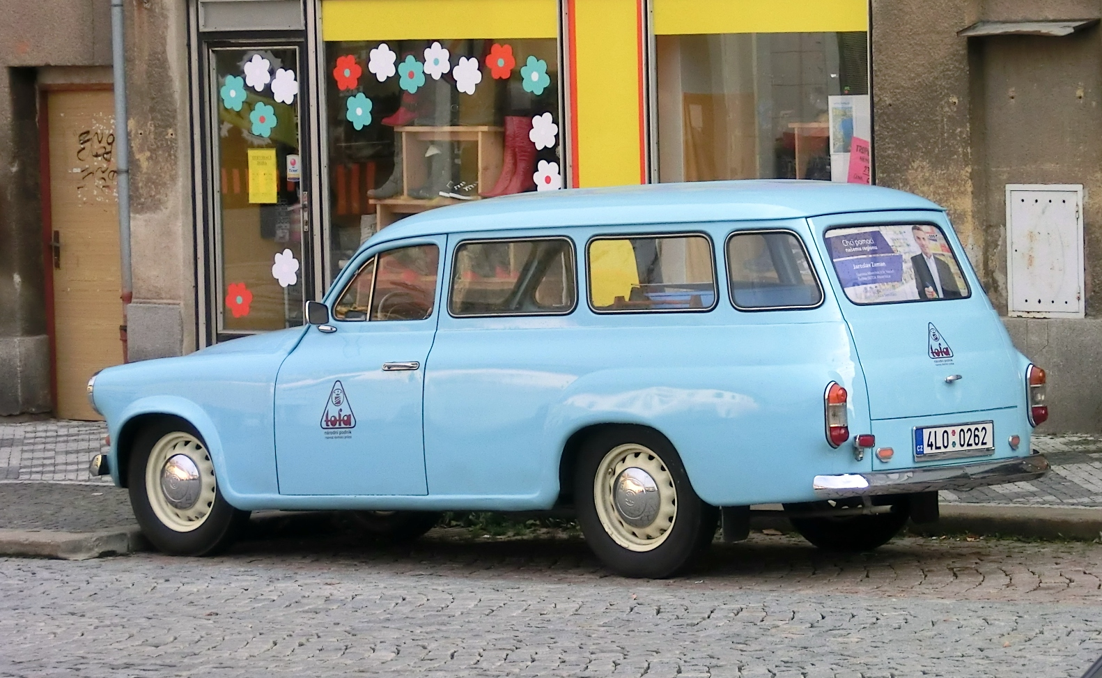 Škoda 1202 STW - služební vozidlo n.p. TOFA (dnes DETOA Albrechtice s.r.o.)